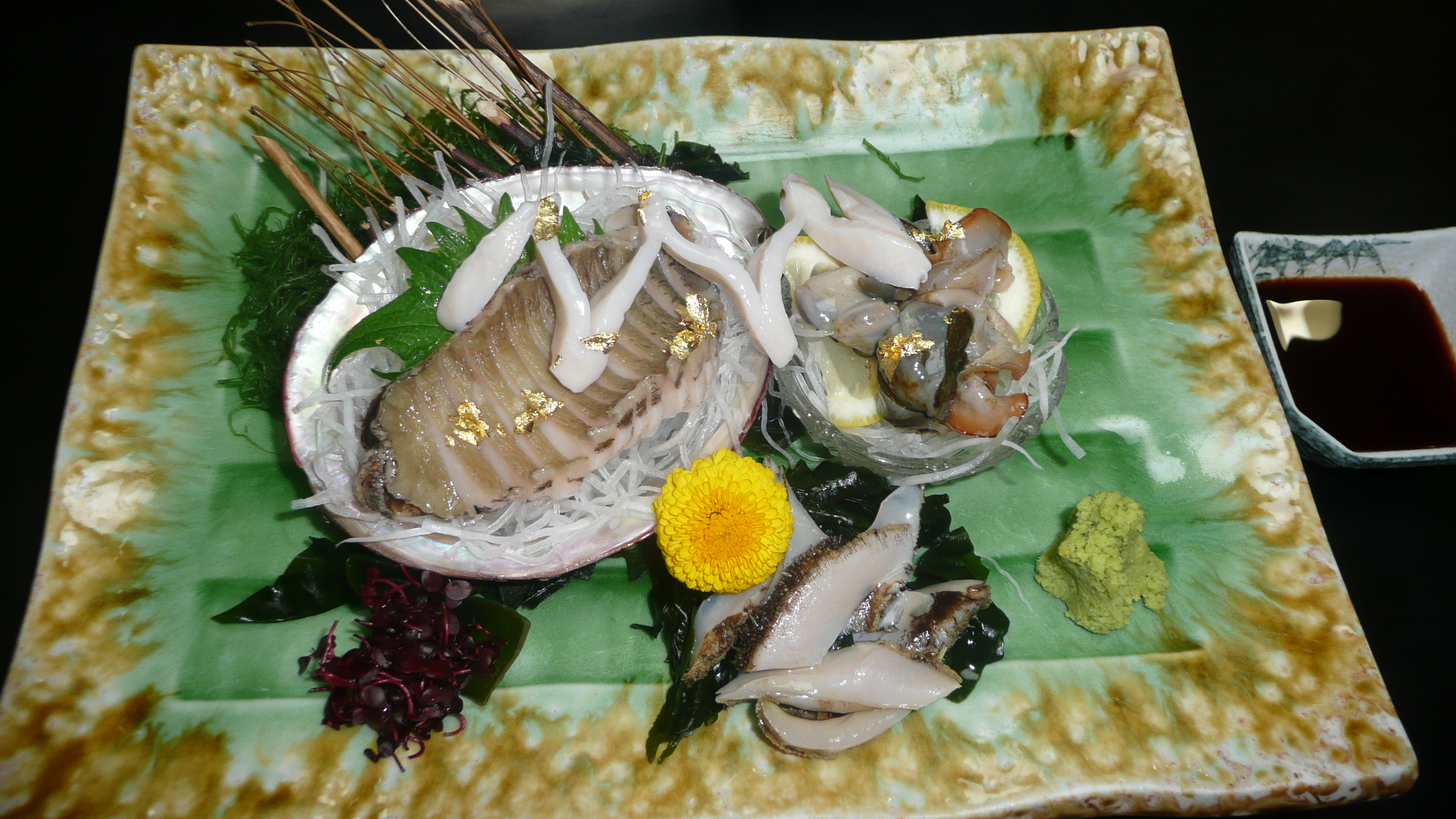 Awabi sashimi kinpaku kazari, Hamamatsu